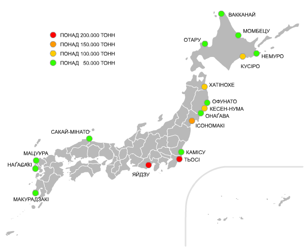 Центри рибальства Японії